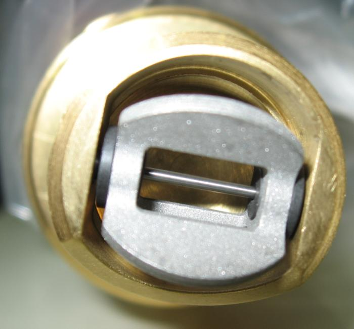 Foto de la paleta de un caudalímetro de molino .